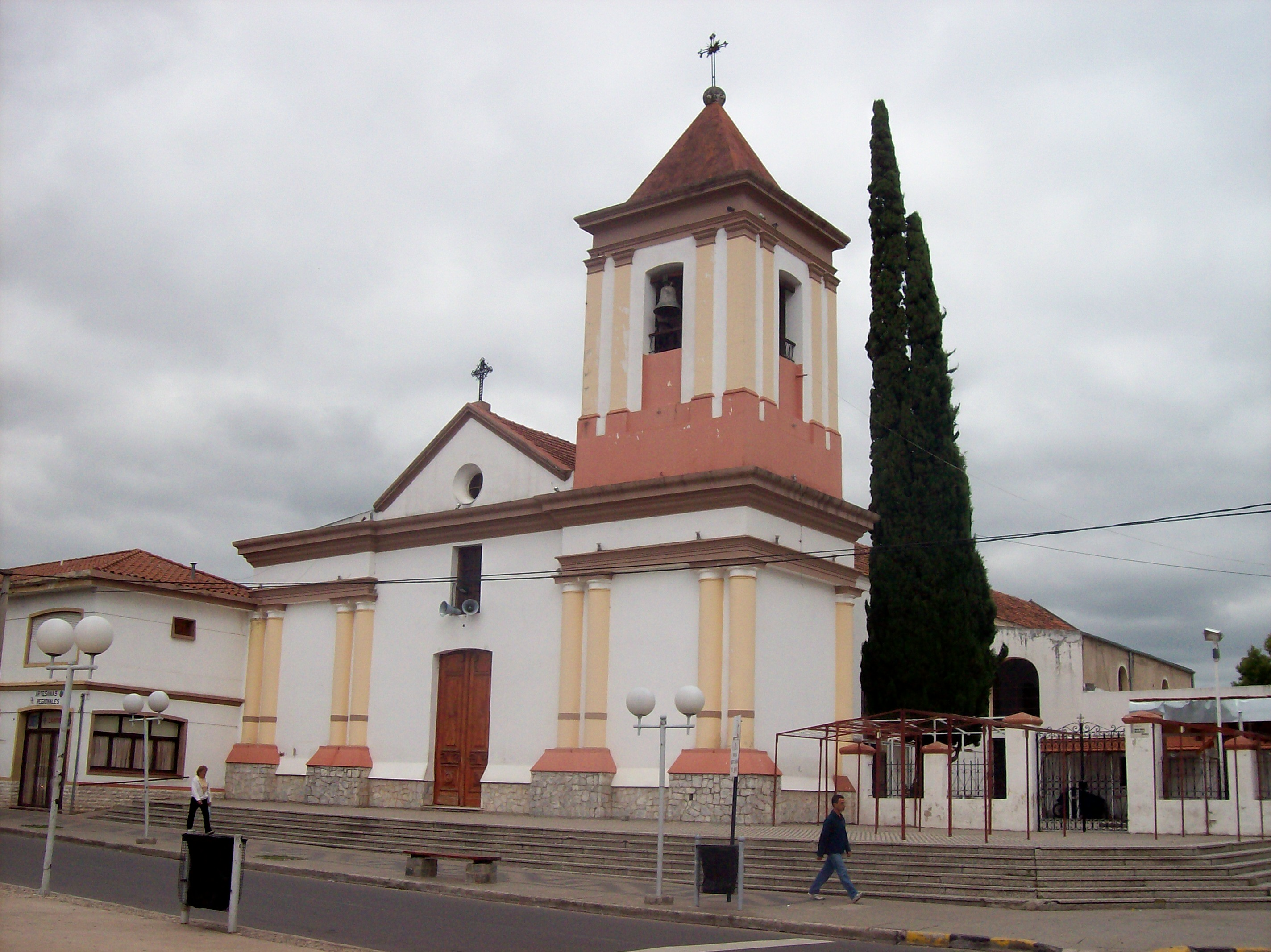 Iglesia Parroquial Nuestra Señora del Rosario, en Av. San martín, en la ciudad de Cosquín, provincia de Córdoba, Argentina. Tomado desde San Martín y Sarmiento. (esquina Jaime Dávalos)